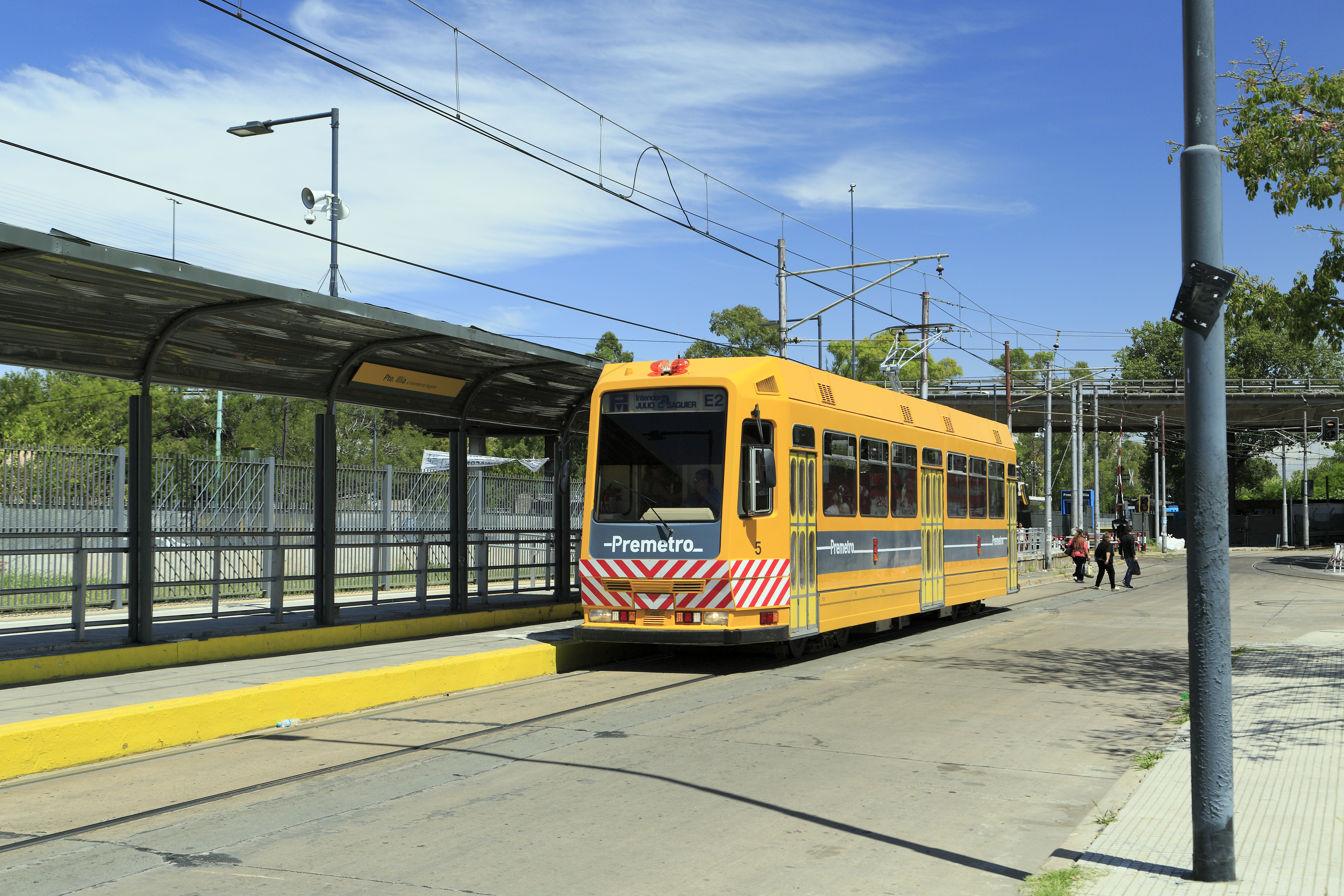 Calle Veracruz, der Zug fährt nach Intendente Julio C. Saguier. Der Triebwagen 5 wurde erst unlängst aufgearbeitet und modernisiert, er fällt durch den glänzenden und sauberen Lack und die neuen Türen aus Kunststoff auf.